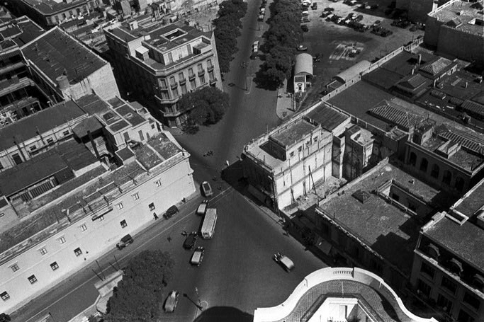 Esquina de Diagonal Sur y Perú desde el Palacio del Concejo Deliberante (hoy Legislatura), Buenos Aires, en 1936.